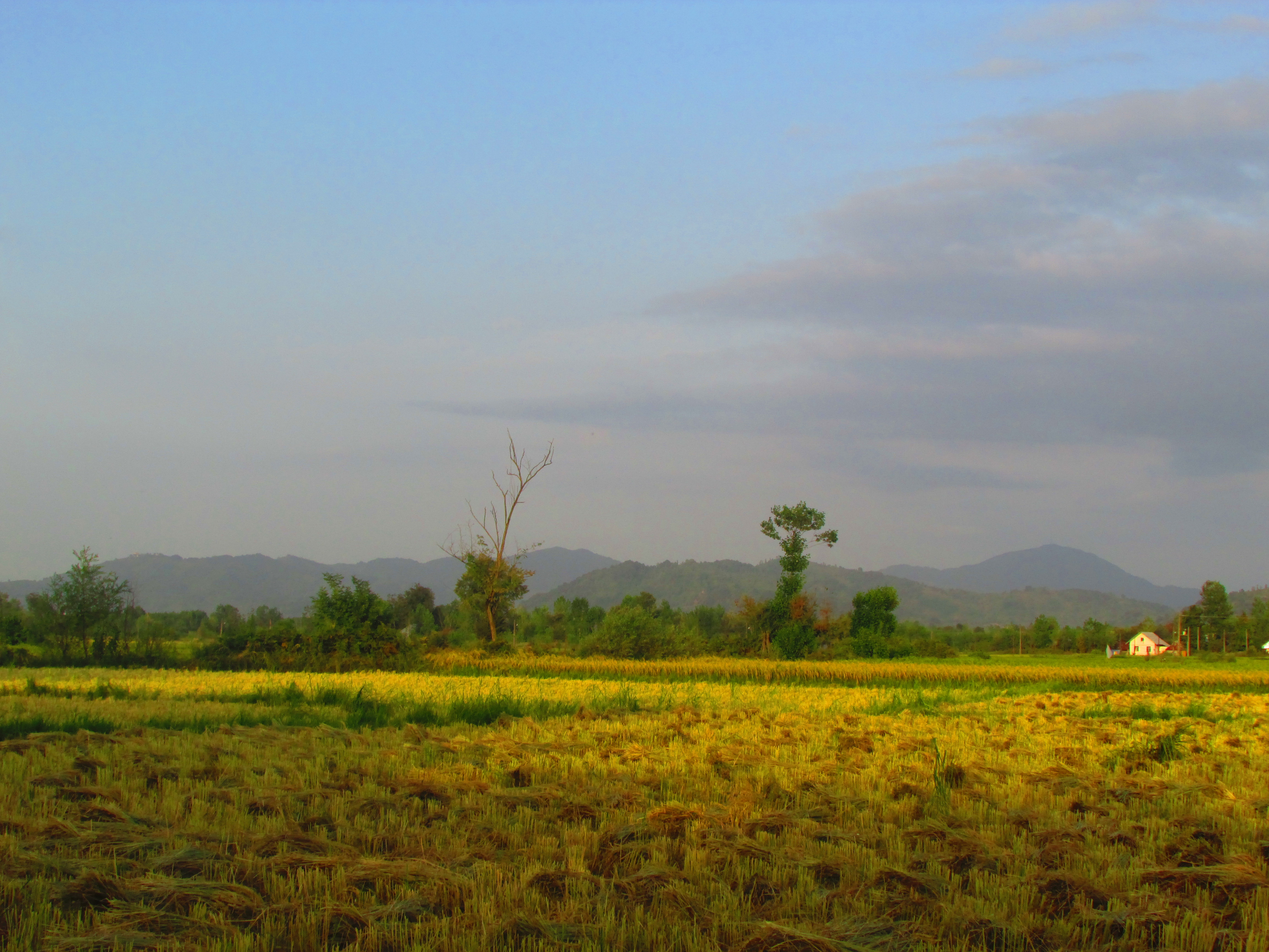 فصل بریدن برنج ها در روستای گلرودبار